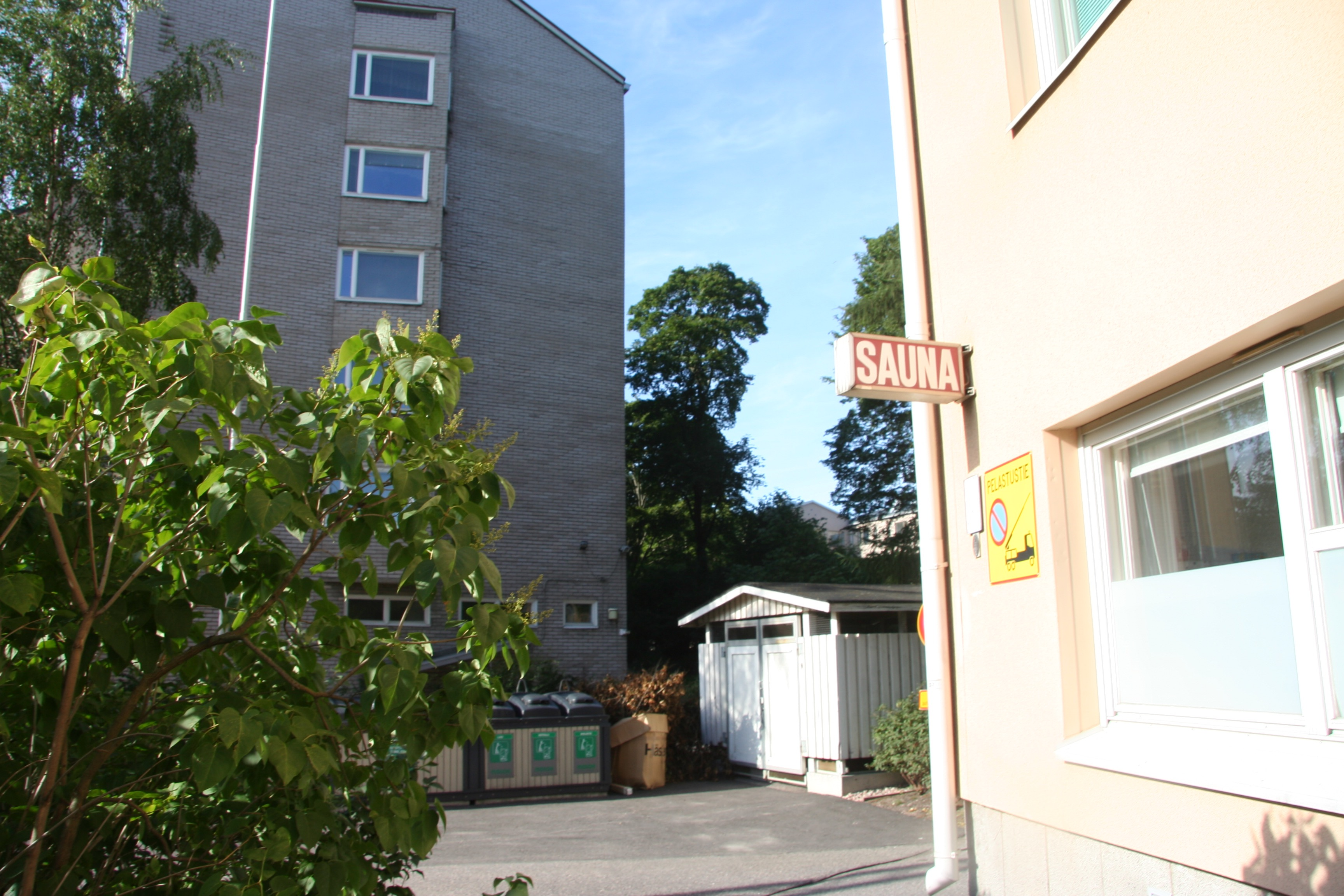 Hermannin sauna, Helsinki